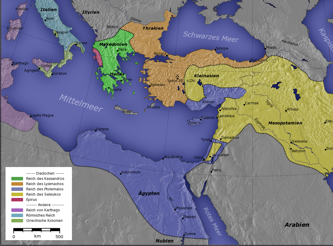 Ptolemaic Empire, c. 300 BC